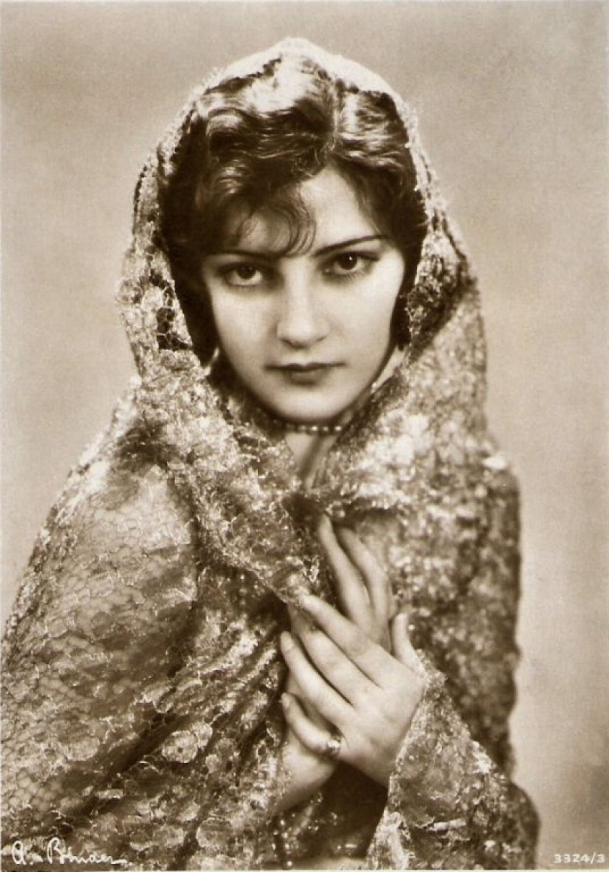 Ita Rina